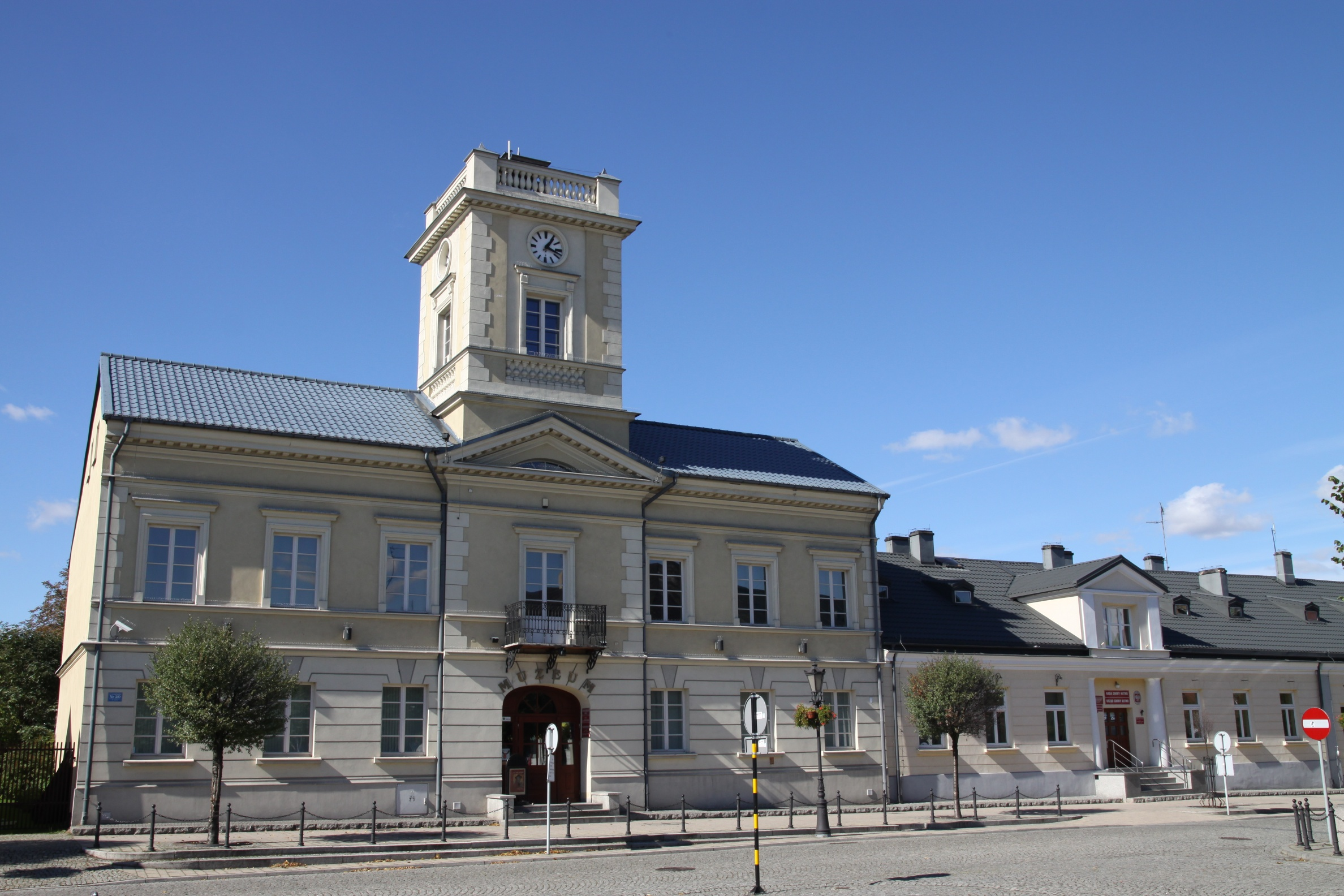 Kutno - Ratusz, mur., 1 poł. XIX w. (zabytek nr 511-III-24 z 13.01.1950; 292/347 z 11.07.1967)